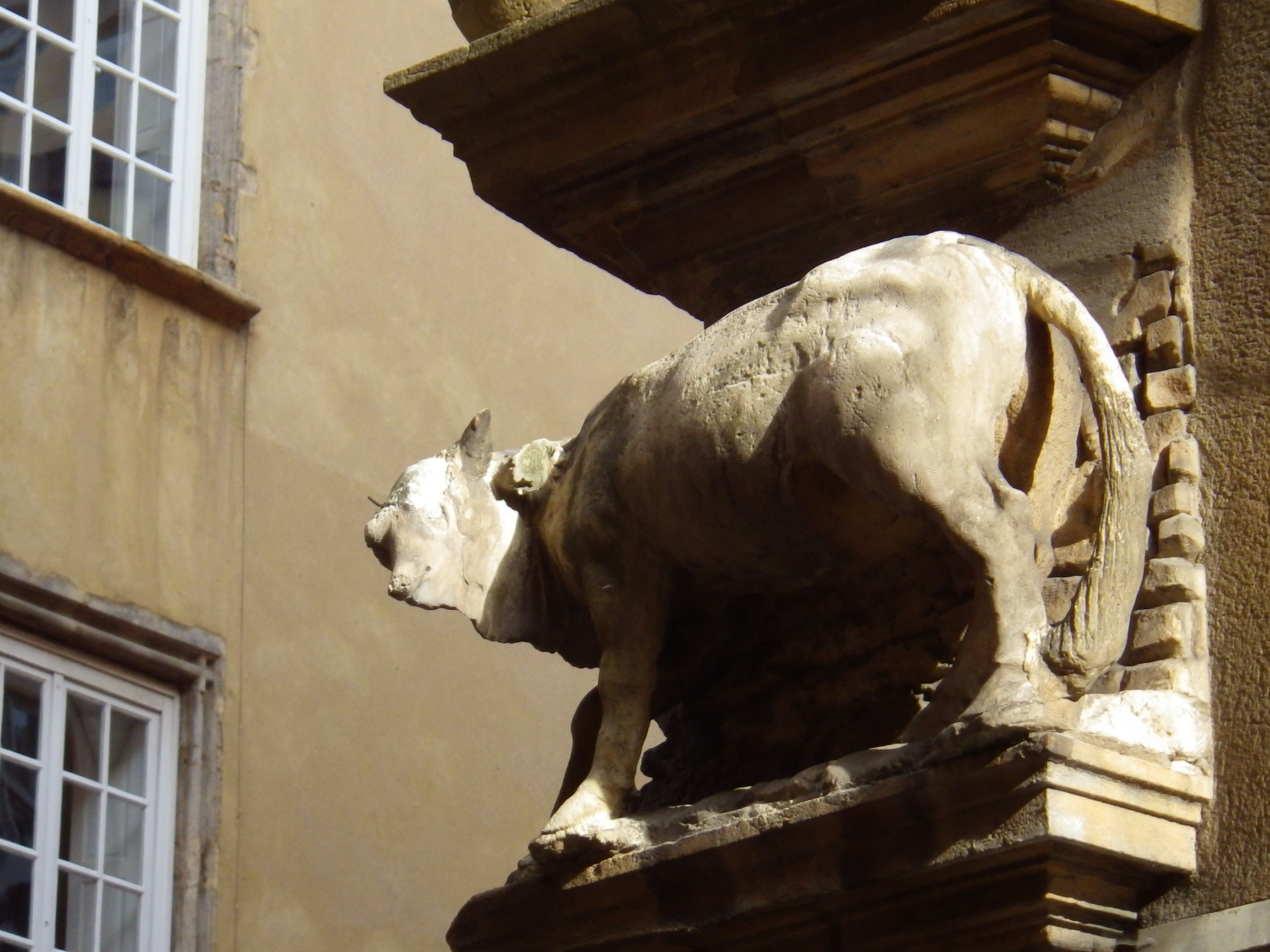 Statue d'angle au milieu de la rue du Boeuf, une des grande rue du Vieux Lyon